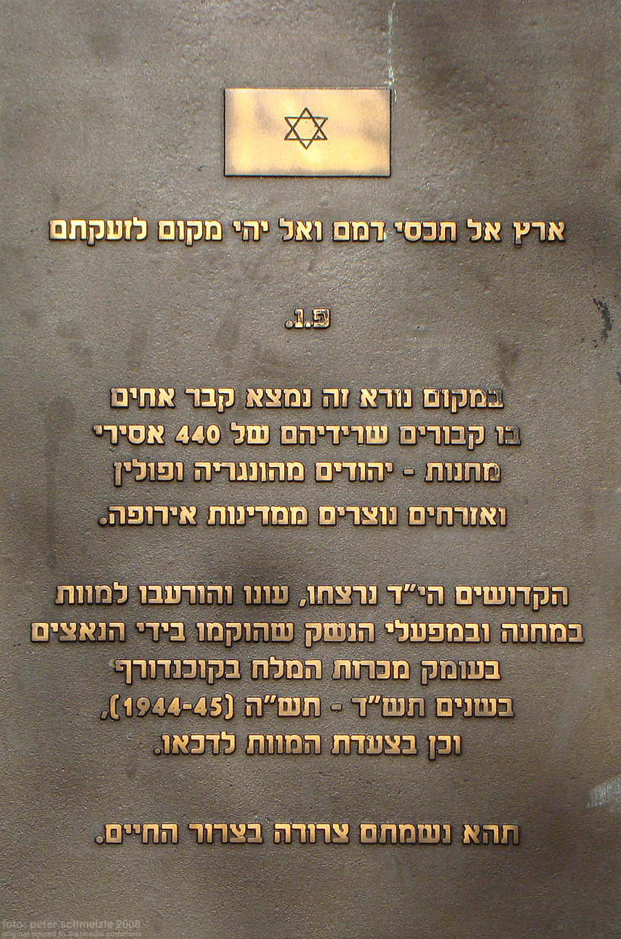 לוחית זיכרון